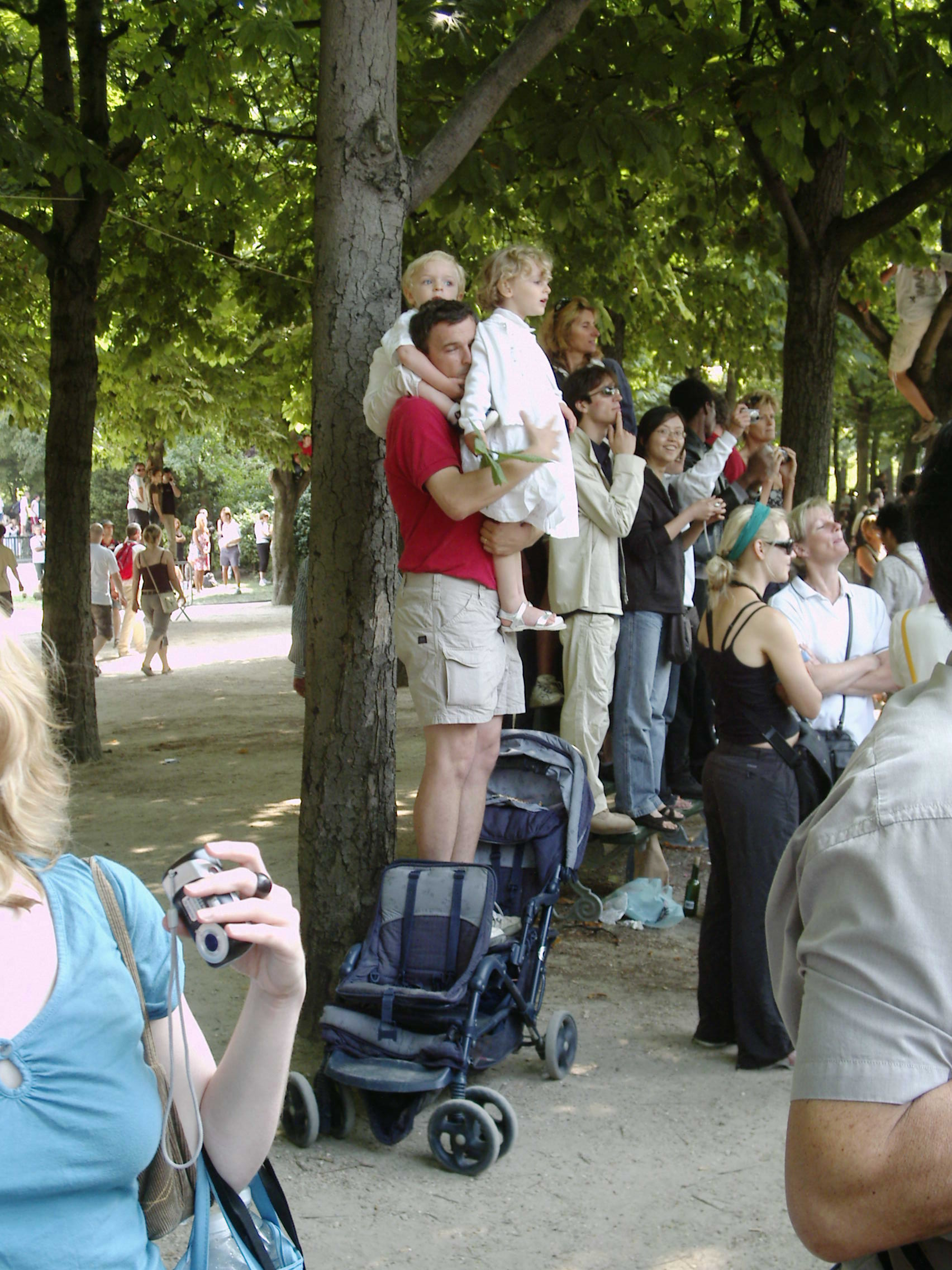 Les spectateurs montent sur tous ce qu'ils peuvent pour voir le défilé du 14 juillet 2006. Au milieu, un père debout sur une poussette, tient un enfant assis sur ses épaules et un autre dans ses bras. Derrière, une dizaine de spectateurs se tiennent debout sur un banc public, serrés les uns aux autres. En haut à droite, un spectateur a grimpé dans un arbre.